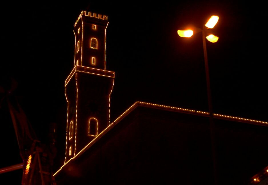 Fürth Rathaus, bei Nacht